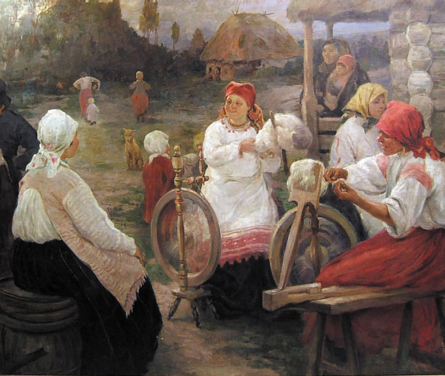 А. А. Бучкури. Пряхи. 1903—1905. Частная коллекция